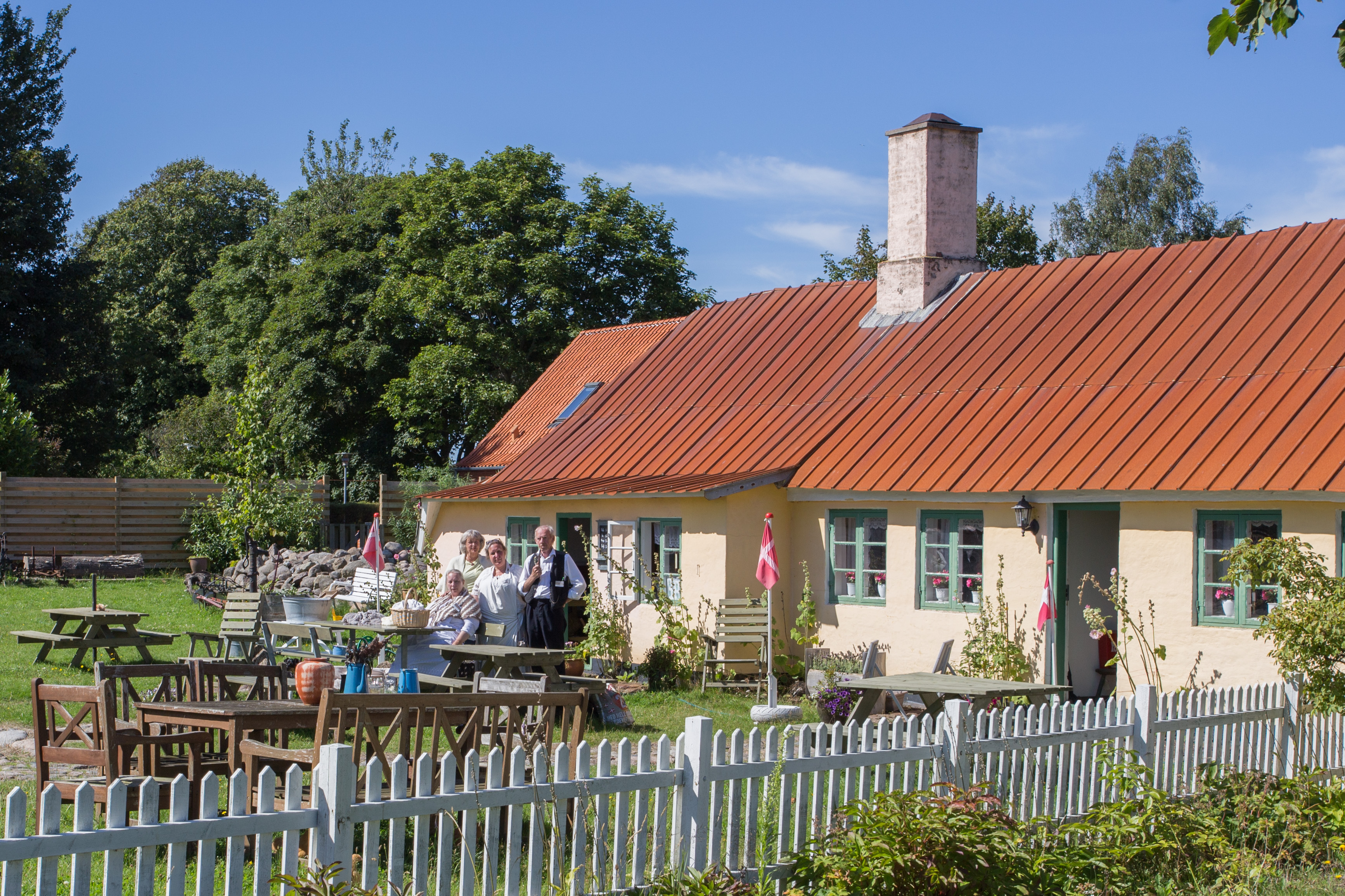 Museet Sognefogedgården, Frederikshavn er med sikkerhed fra 1713.